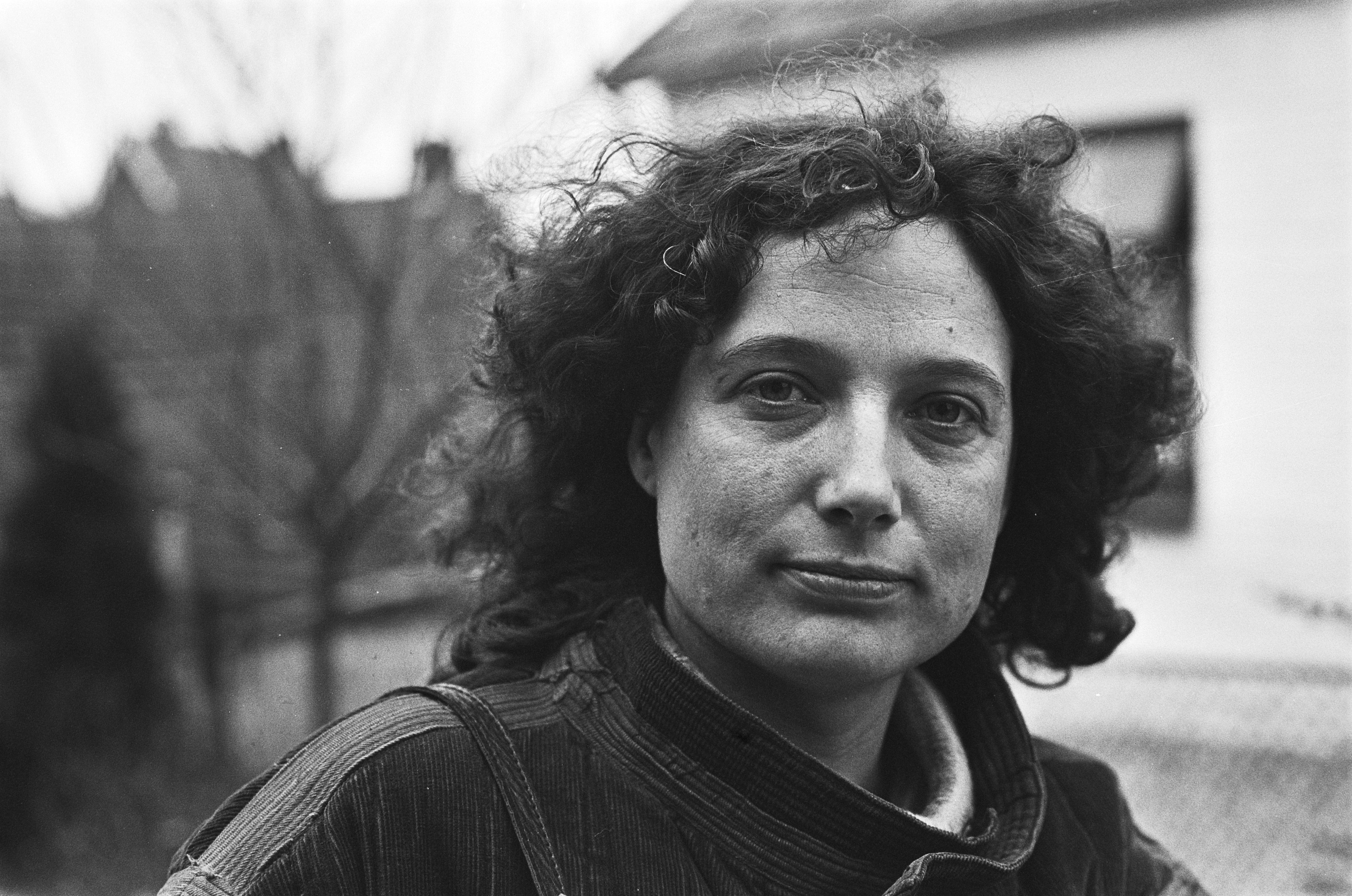 Heleen Levano bij de onthulling van het zigeunermonument (1978)